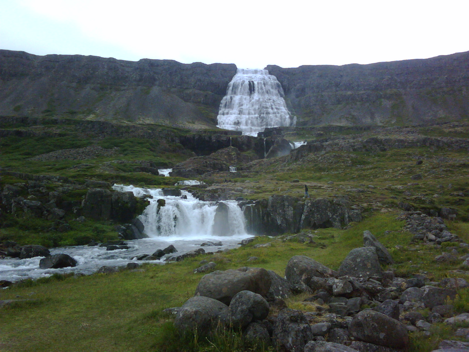 Dynjandi